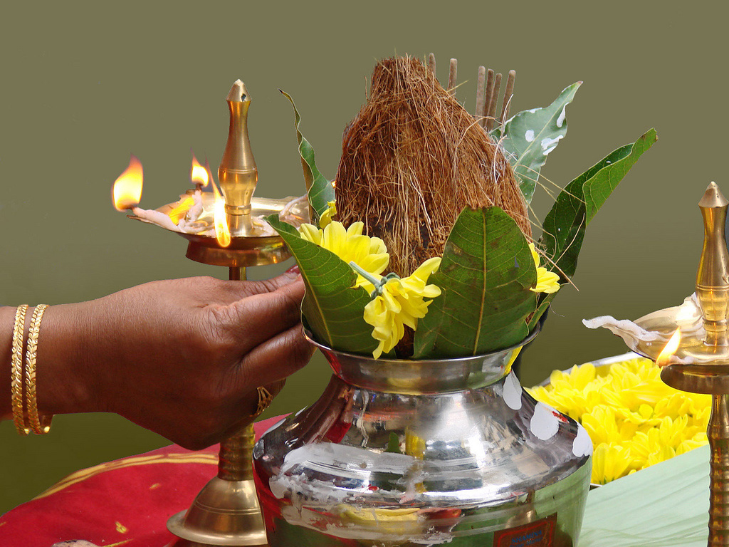 Des autels sont élevés tout au long du parcours du char de Ganesh. Les fidèles font éclater des noix de coco lorsque le char arrive à leur hauteur. La défilé du char de Ganesh (Ganesh Chaturthi) s'est déroulé dimanche 31 août 2008 à Paris dans le quartier de la gare du nord. Elle est organisée chaque année par l'association du temple de Ganesh (Sri Manicka Vinayakar Alayam) et rassemble des milliers d'hindous.